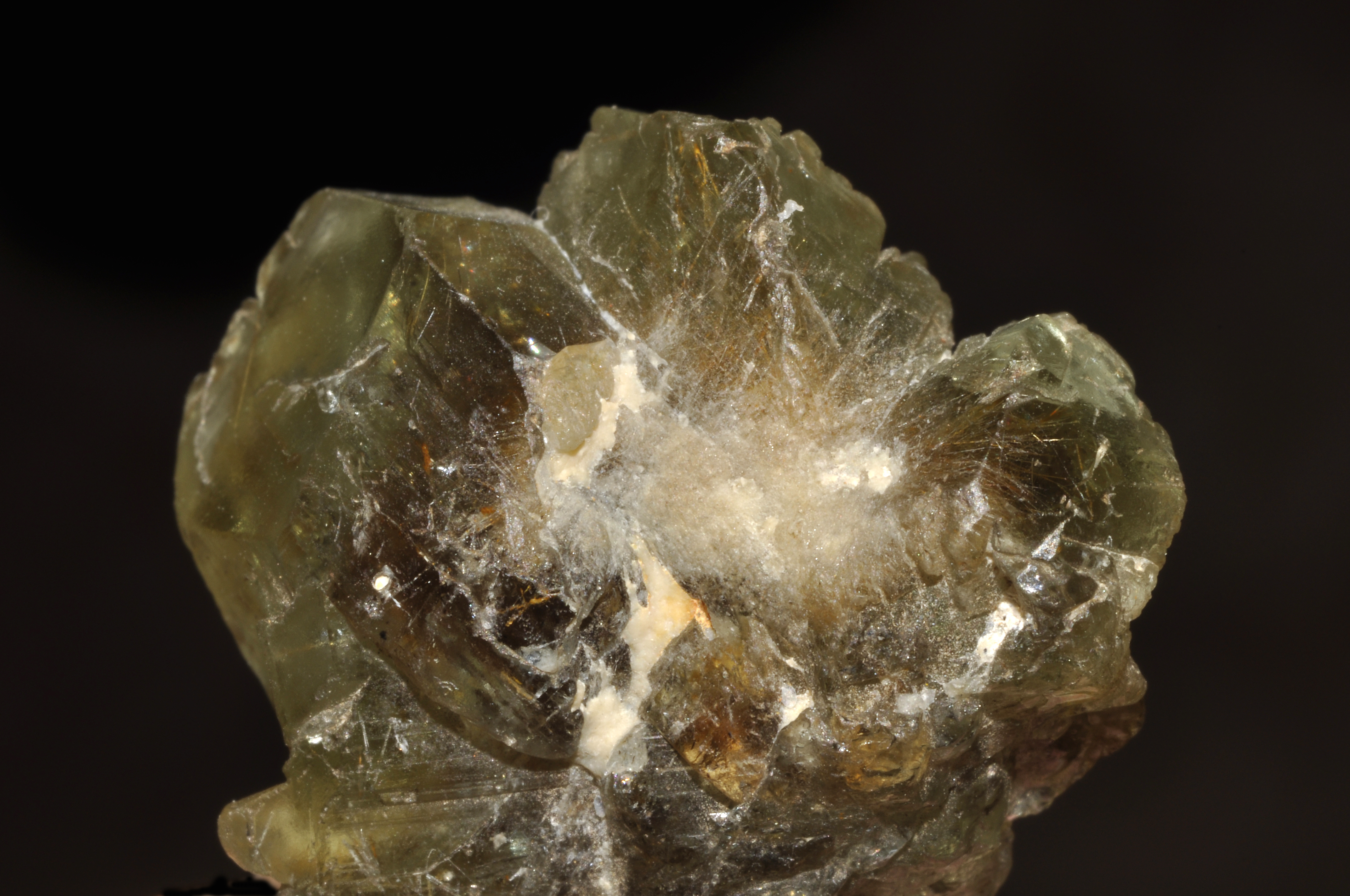 cristal de chrysobéryl